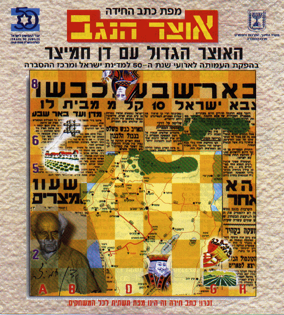 מיצג של חמיצר חידון אוצר הנגב